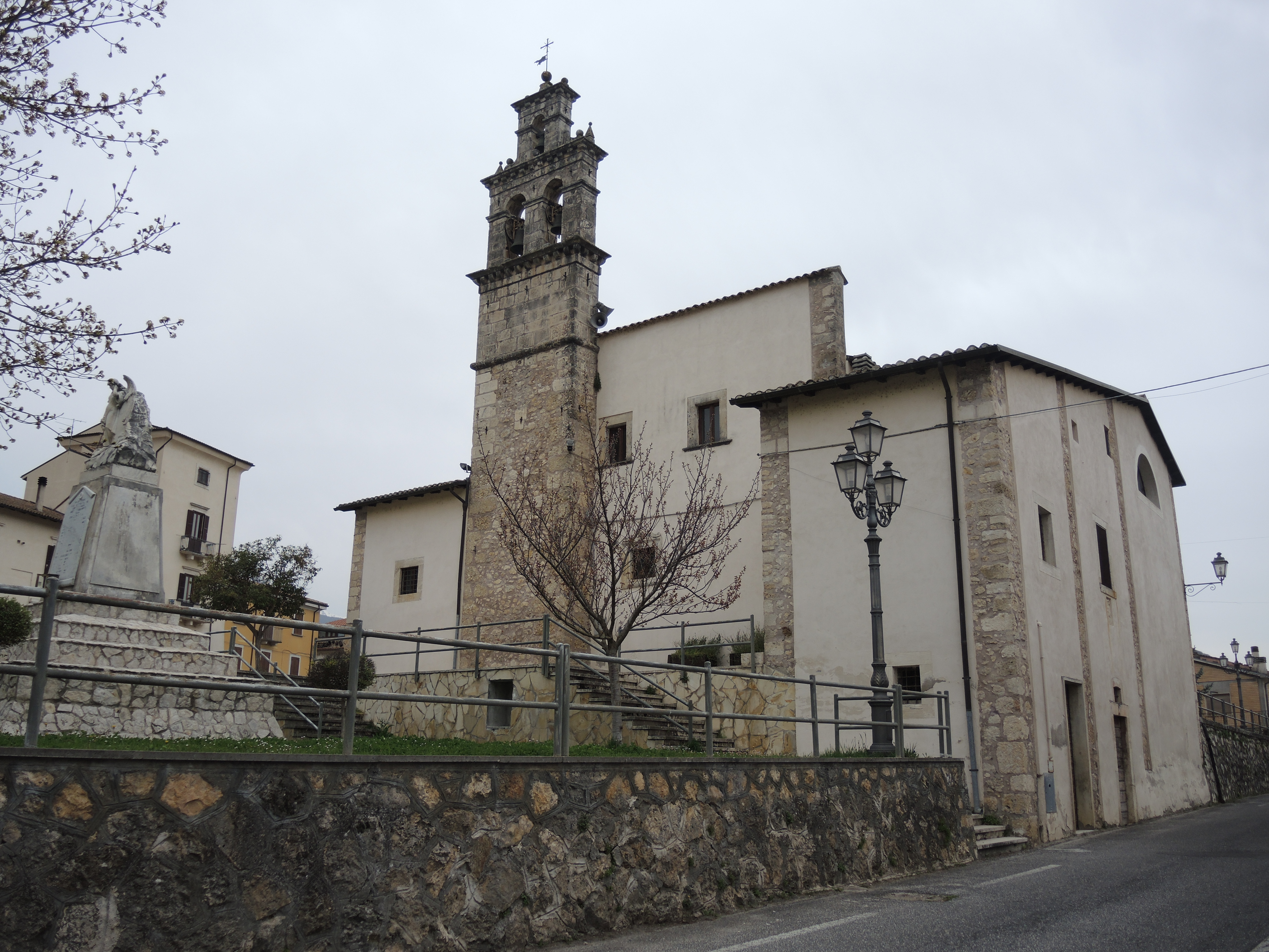 Molina Aterno: Chiesa di San Nicola di Bari